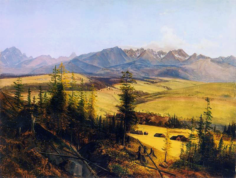 Widok Tatr z Poronina (Widok z Galicowej Grapy) 1836. Olej na płótnie naklejonym na tekturę. 35 x 46,5 cm. Muzeum Okręgowe, Toruń.